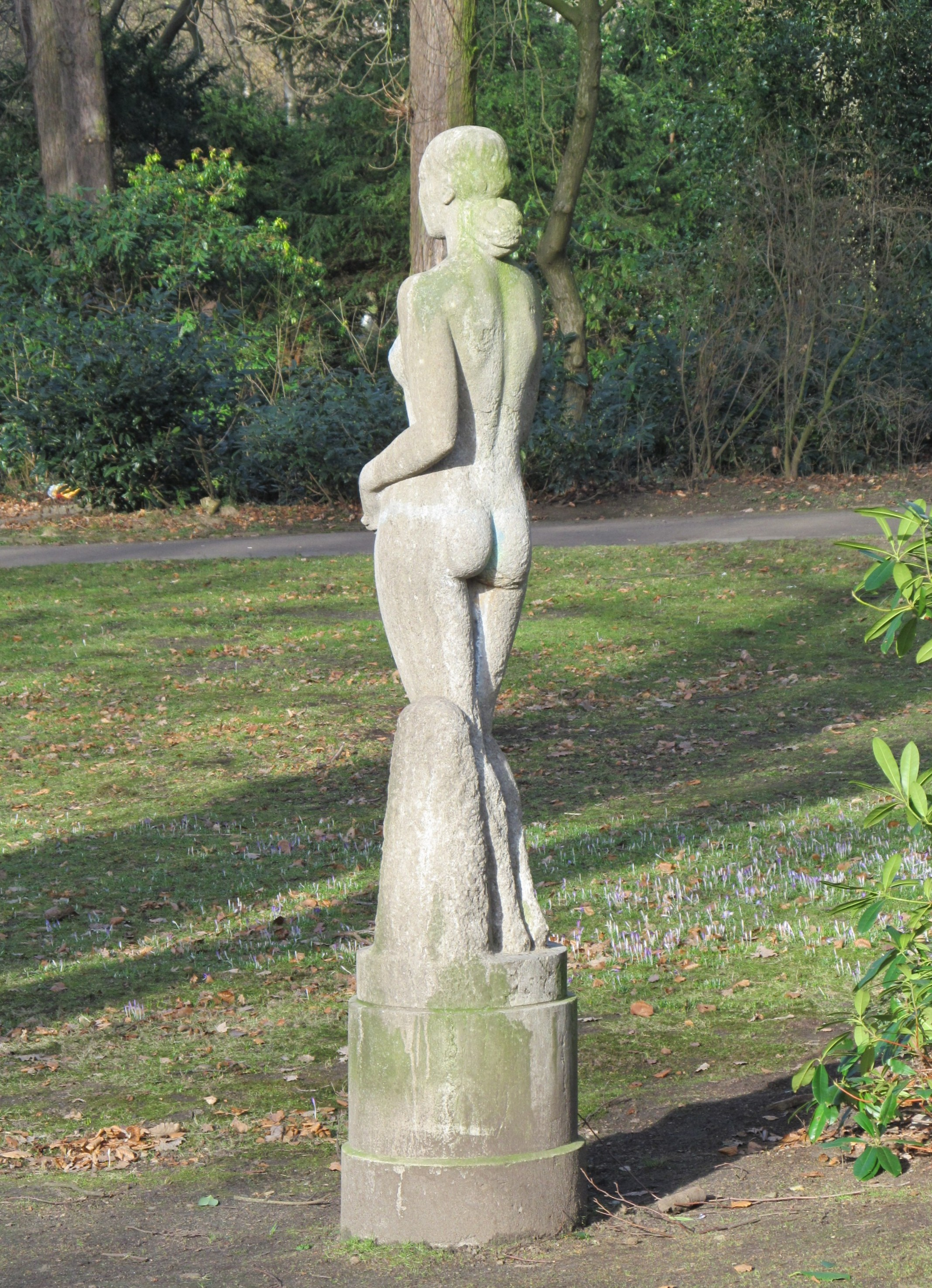 Hammer Park in Hamburg-Hamm, Plastik "Jungfrau" von Paul Hamann